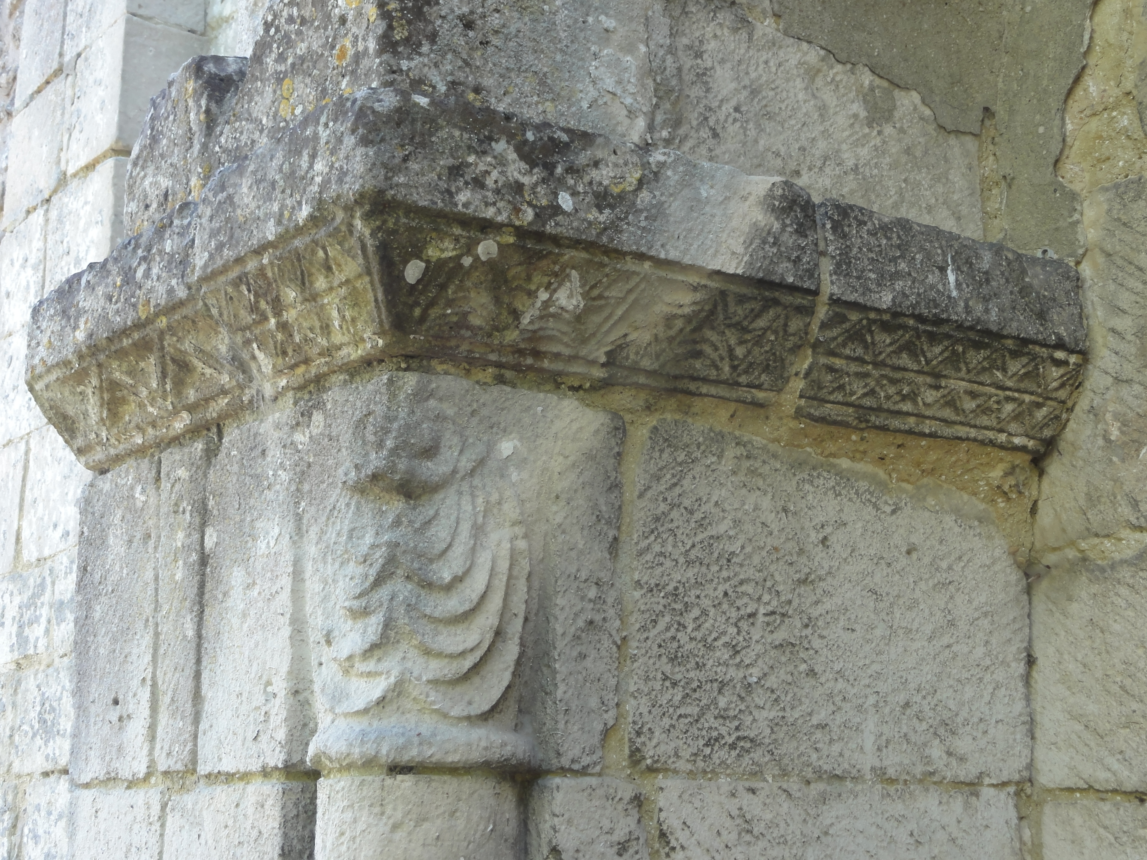 Portail occidental, tailloir et chapiteau à g.